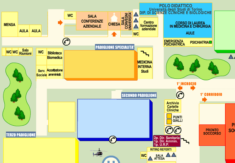 Pianta schematica dei padiglioni dell'ASO S.Luigi Gonzaga con brevi indicazioni